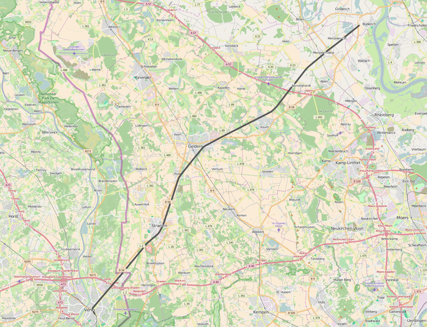 DB 2003, Büderich - Venlo